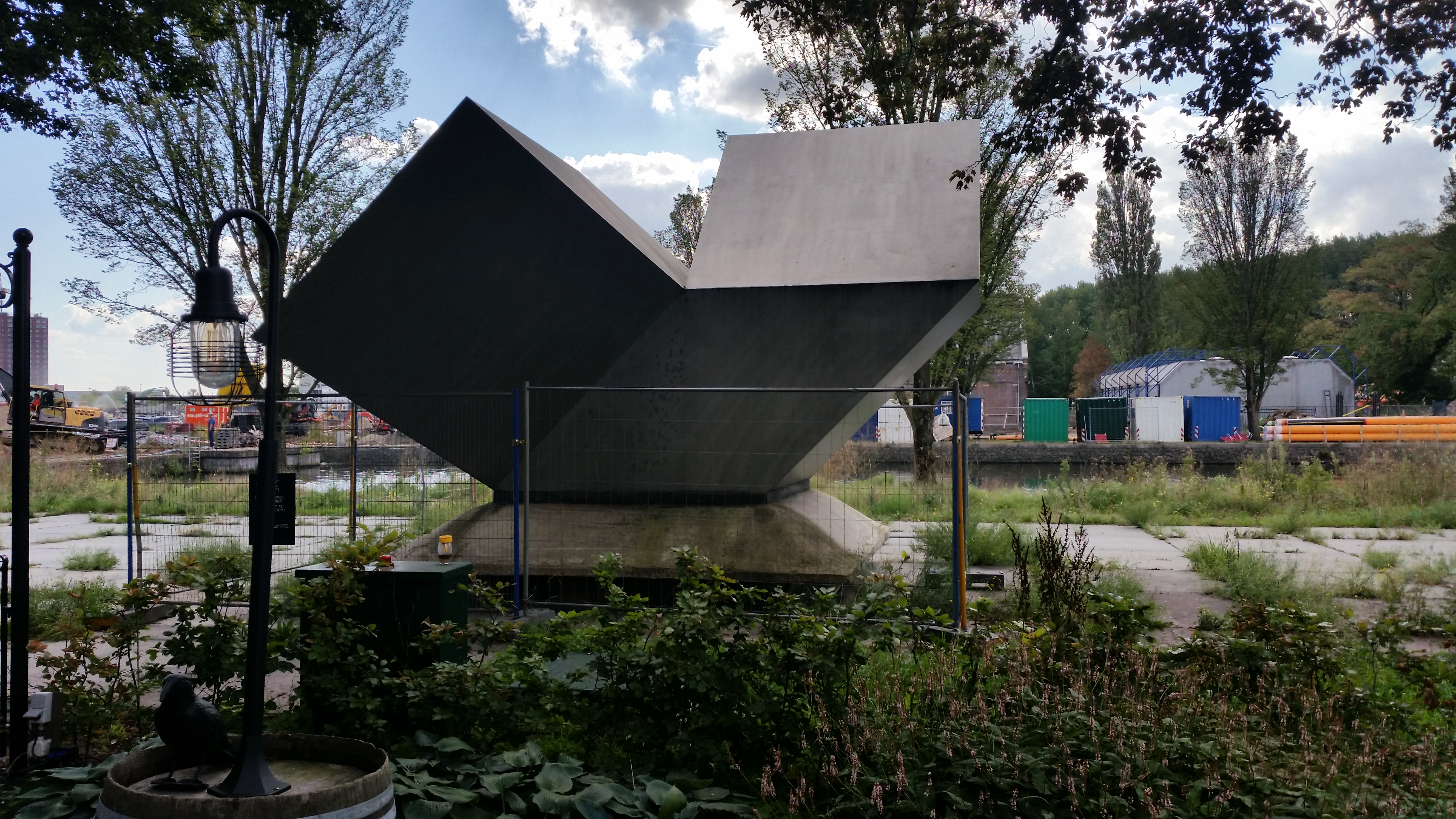 Kunstwerk van André Volten in Park Somerlust, Amsterdam-Oost; het heeft geen titel, is in 2018 uitgegraven vanwege sanering terrein